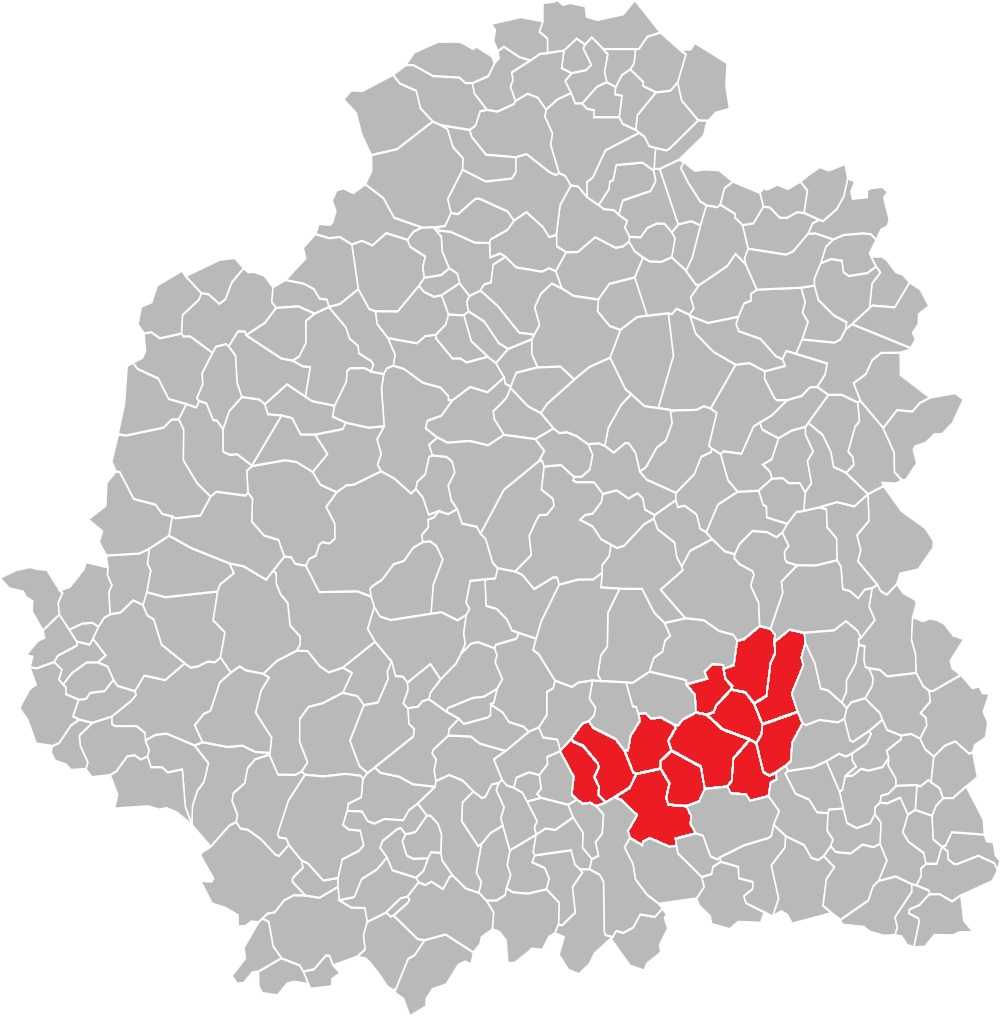 Carte des communes de l'Indre (36) : Le canton de Neuvy-Saint-Sépulchre, de 1790 à 2015.